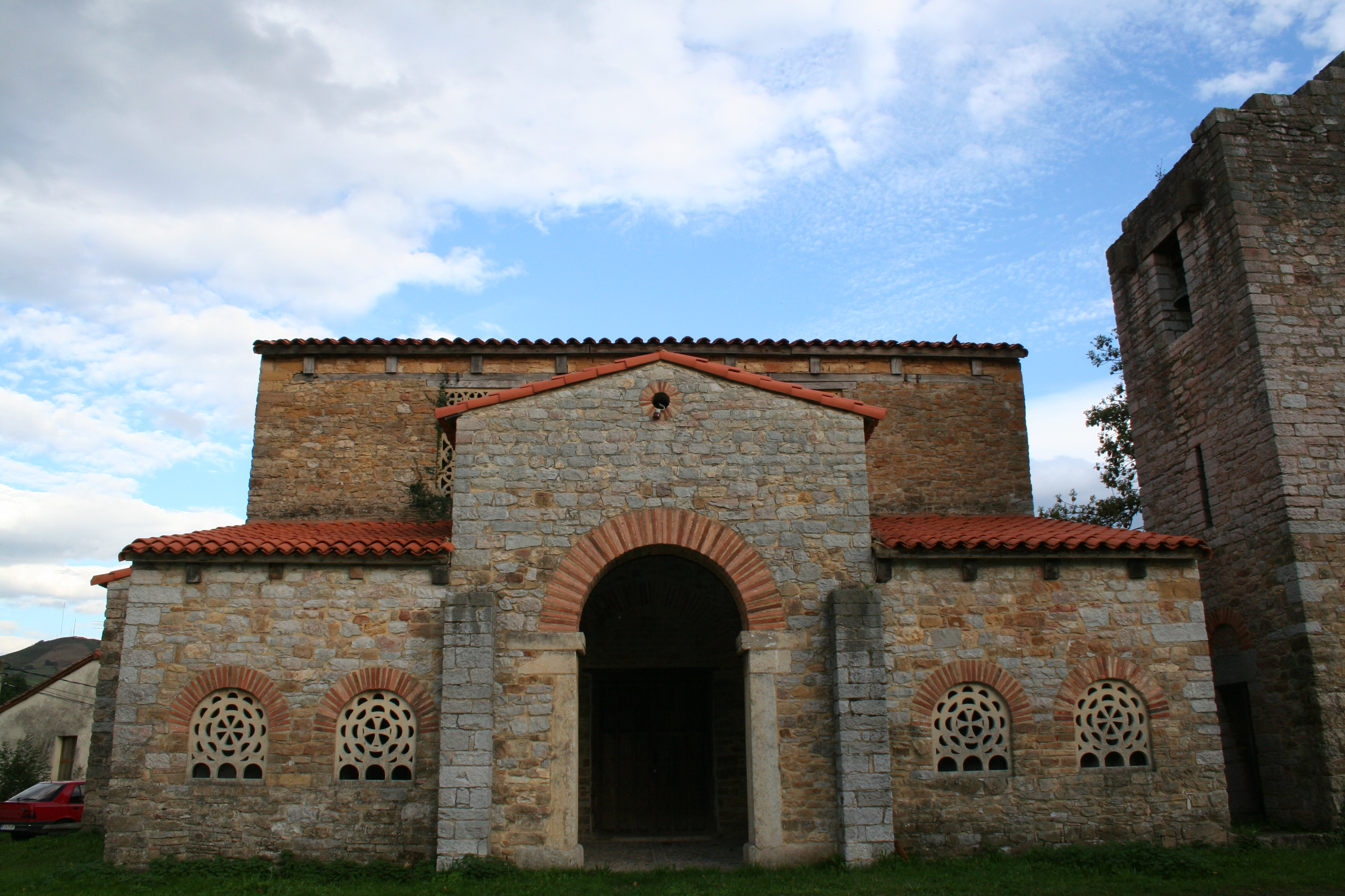 Frontal de la Iglesia de Santa María de Bendones, Oviedo